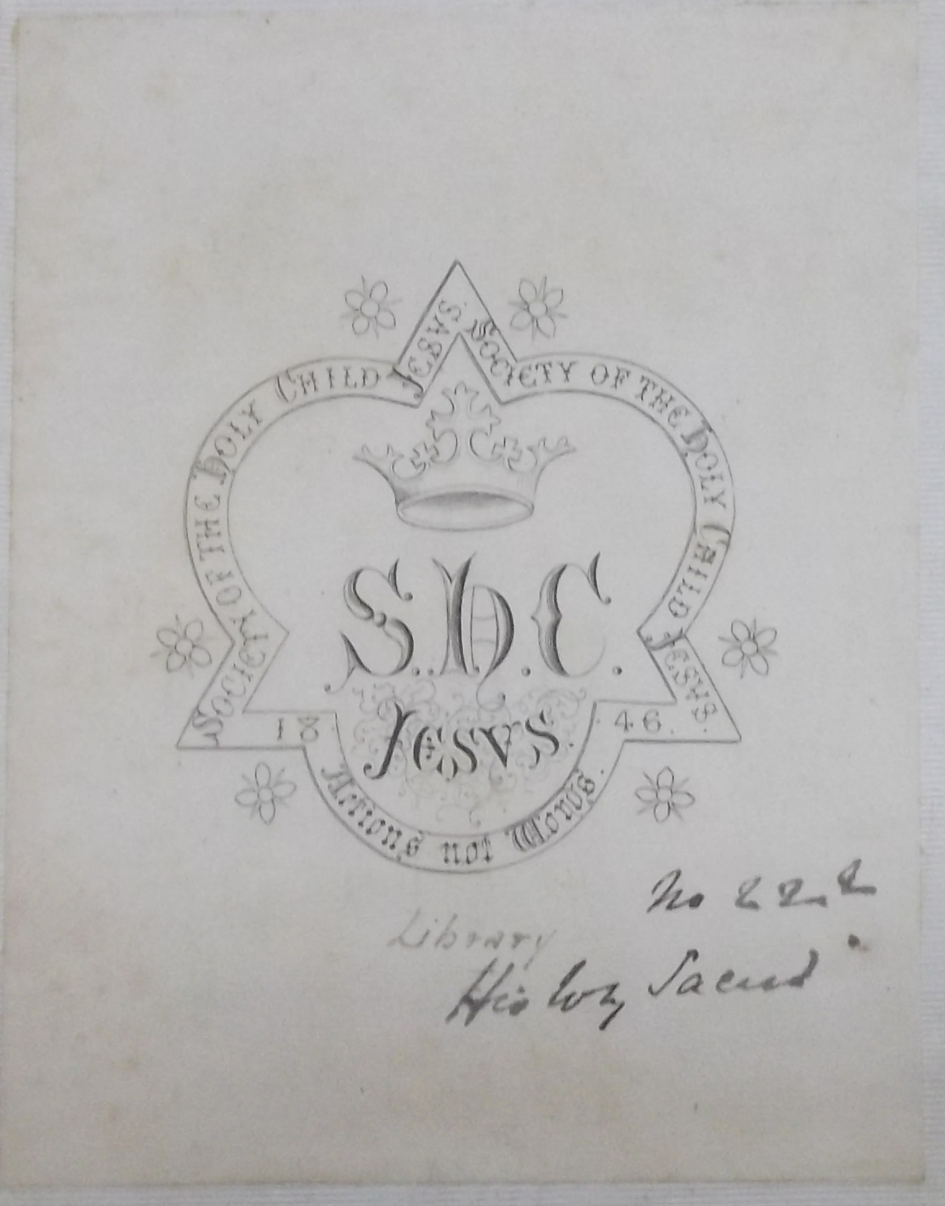 Histoire des souverains pontifes romains / par M. de Chevalier Artaud de Nontor. – Paris : Jacques Lecoffre, 1851. Ex-libris institucional da Society of the Holy Child Jesus.